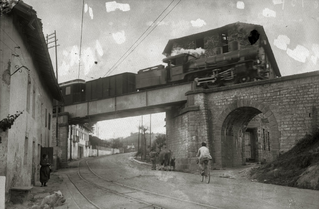 Plazaolako trena, Lasarten